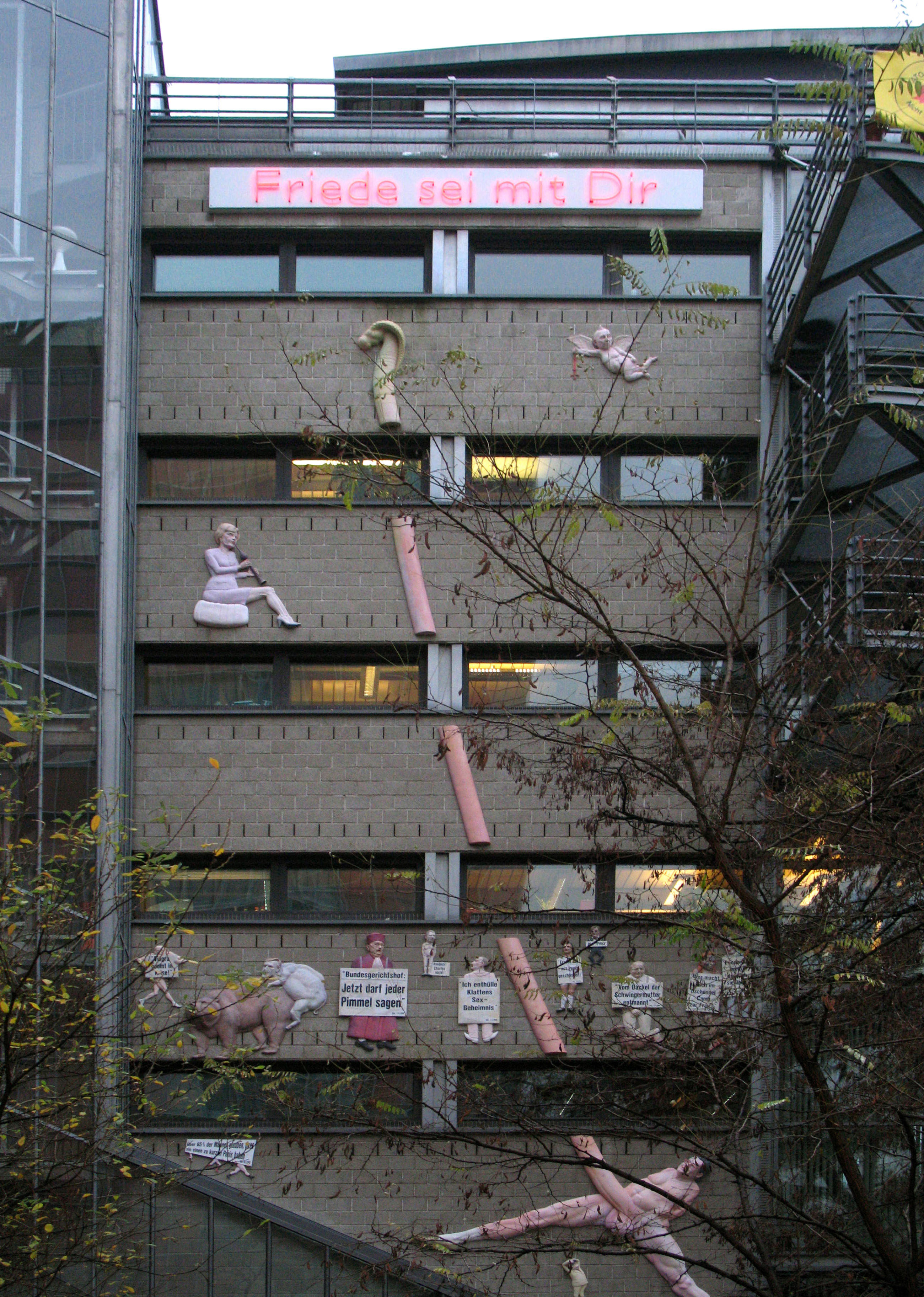 Relief Friede sei mit Dir von Peter Lenk